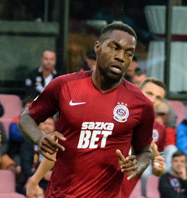 Georges Mandjeck